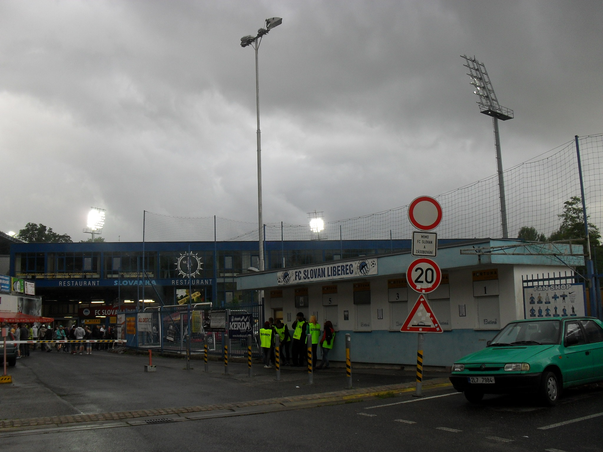 Vchod do stadionu U Nisy během fotbalového zápasu